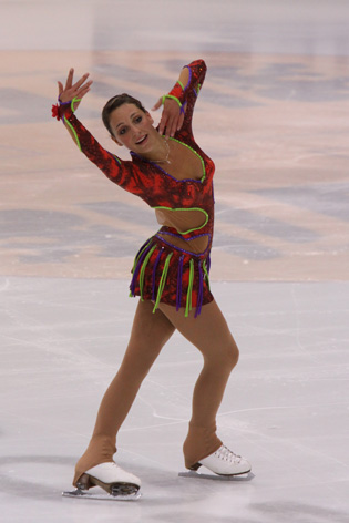 2009 Junior Grand Prix in Dresden (Pokal der Blauen Schwerter) - Sandy Hoffmann